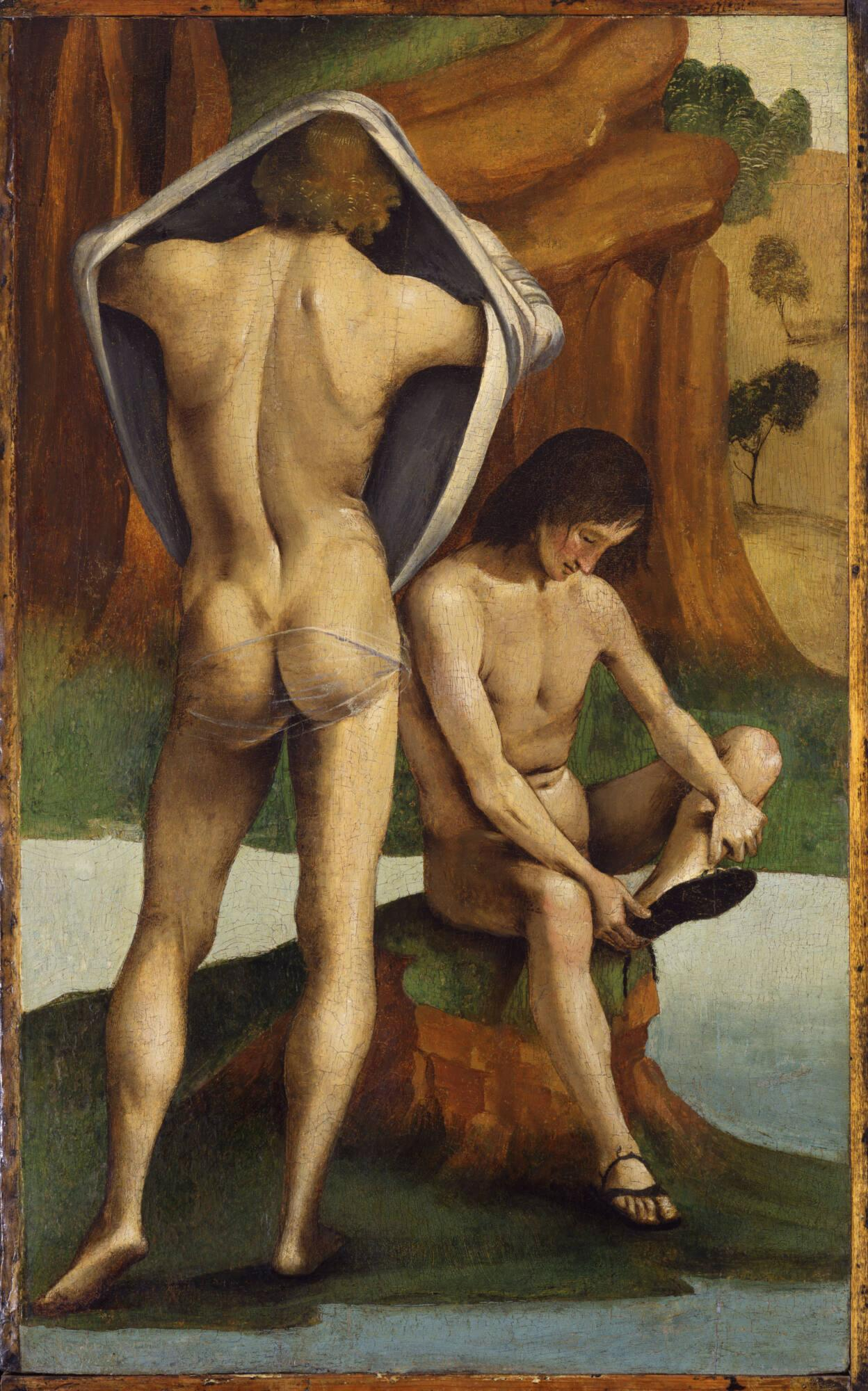 Fragment des Altarmittelteils der Pala Bichi, Sant'Agostino, Siena als Hintergrund einer Christopherus-Skulptur